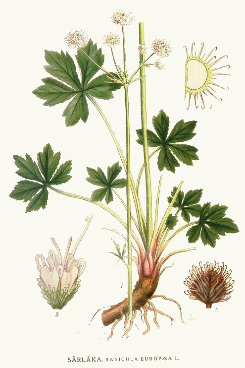 Original Description Sårläka, Sanicula europaea L.